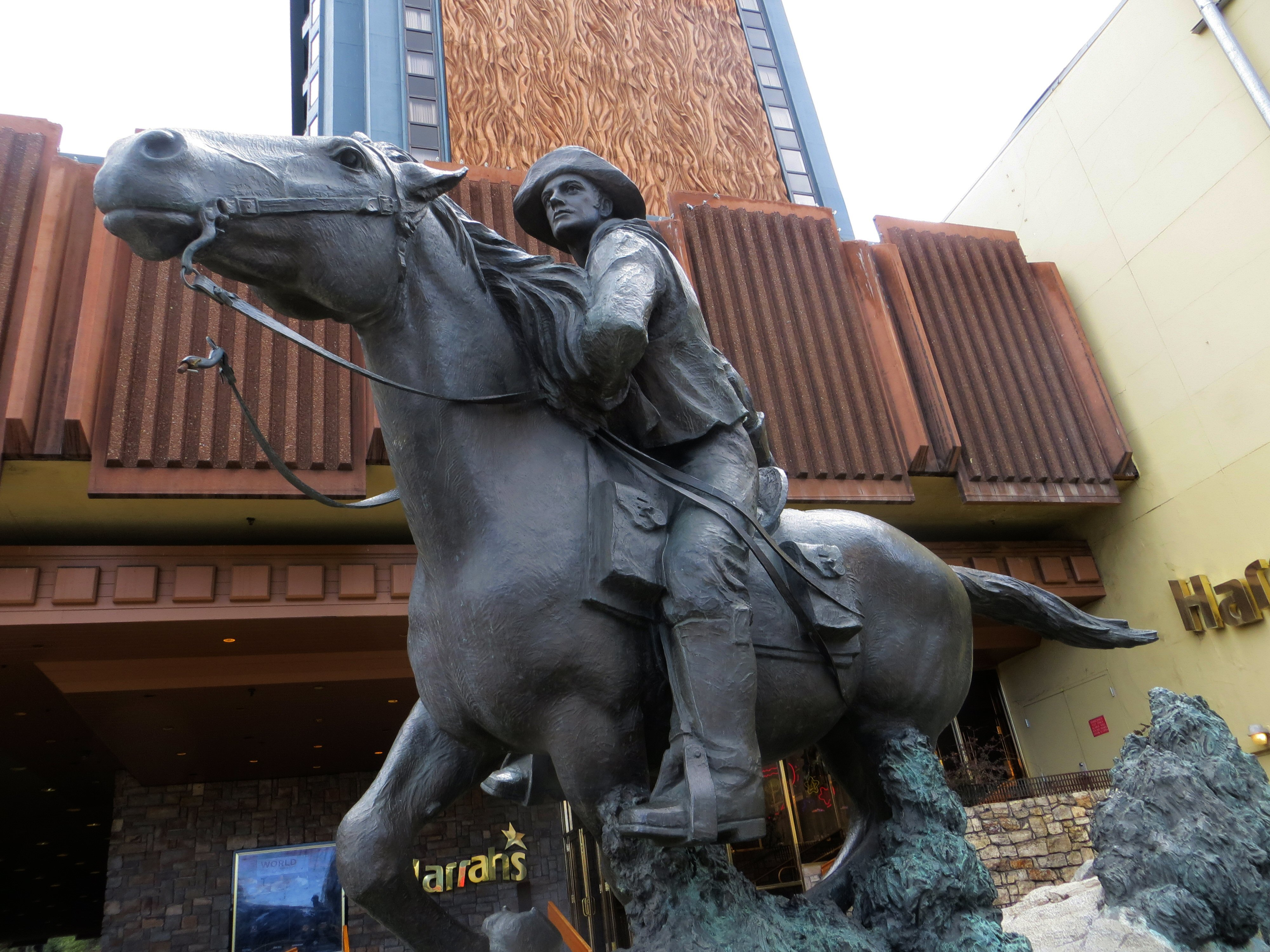 Pony Express, Harras